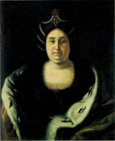 Никитин, Иван Никитич (?) Портрет царицы Прасковьи Федоровны, урожд. Салтыковой Первая четверть XVIII в. Холст, масло. 97х78 см Троице-Сергиевский государственный историко-художественный музей-заповедник